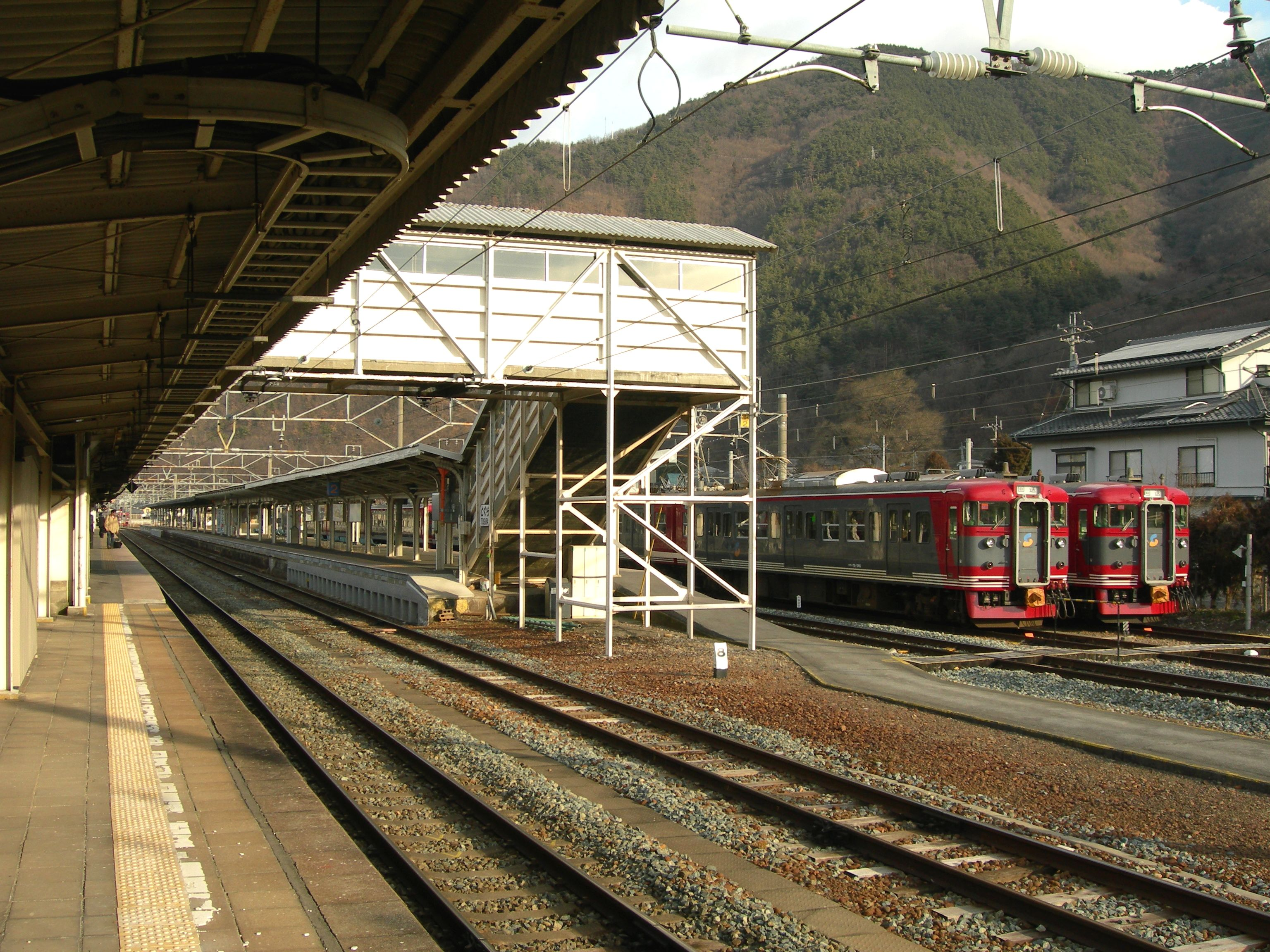 しなの鉄道 戸倉駅ホーム